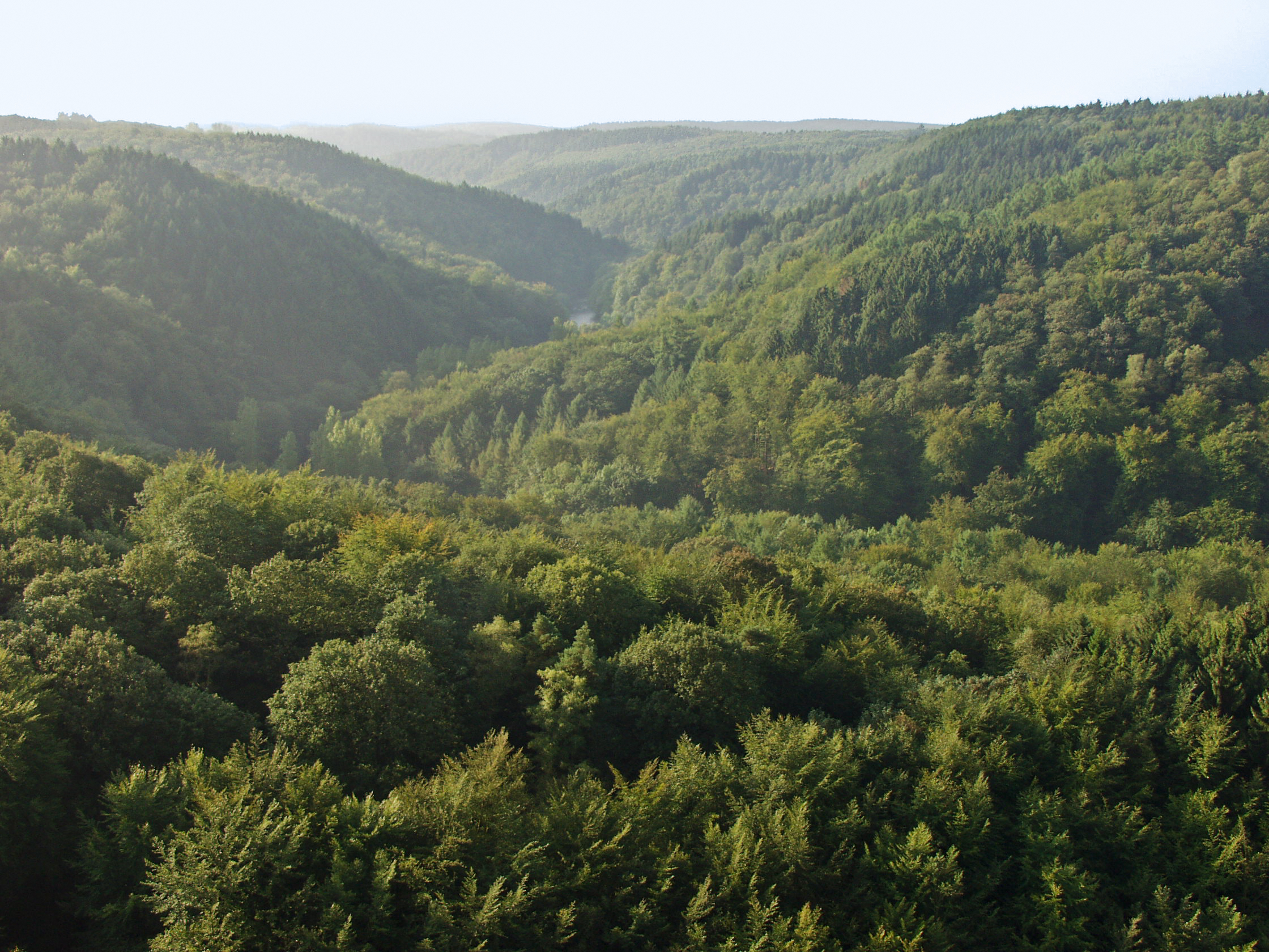 Blick von der Müngstener Brücke nach Süden auf die Wupper und die umliedenden Wälder